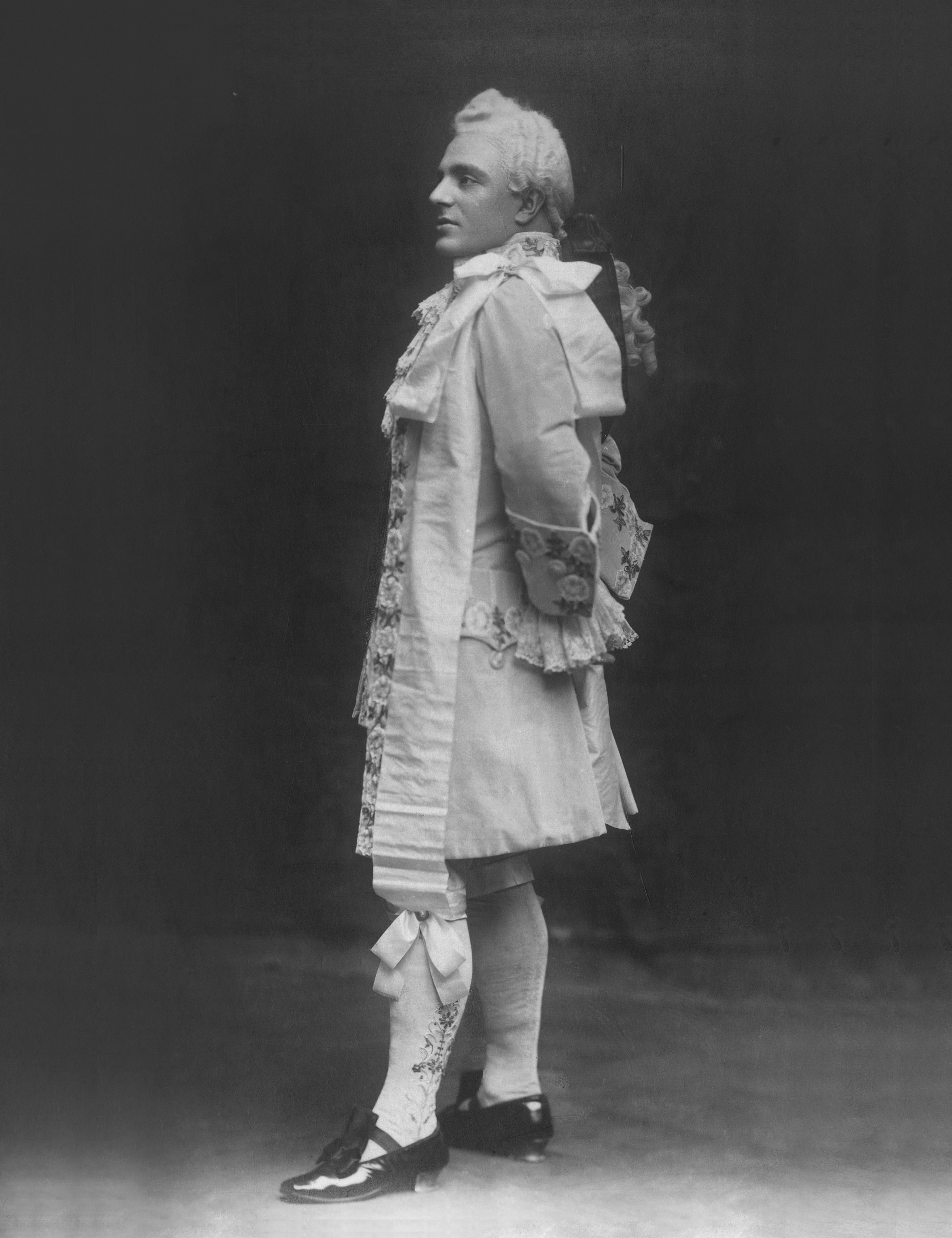 El tenor Josep Palet caracteritzat de cavaller Des Grieux de l'òpera Manon Lescaut de Giacomo Puccini.